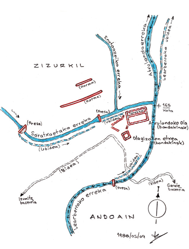 Atxulondo burdinolaren planoa